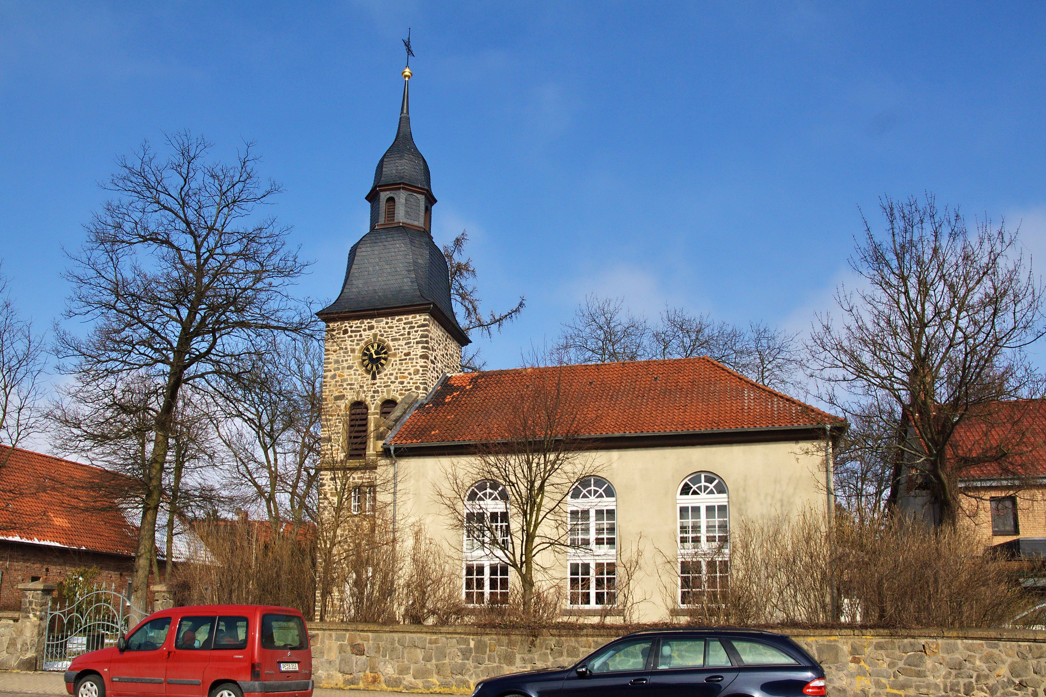 Kirche von 1835 in Abbensen (Edemissen), Niedersachsen, Deutschland